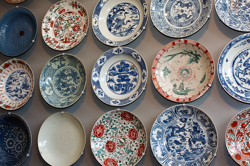 Zaal met Swatow-schalen en Martavanen Princessehof - Swatow-schalen